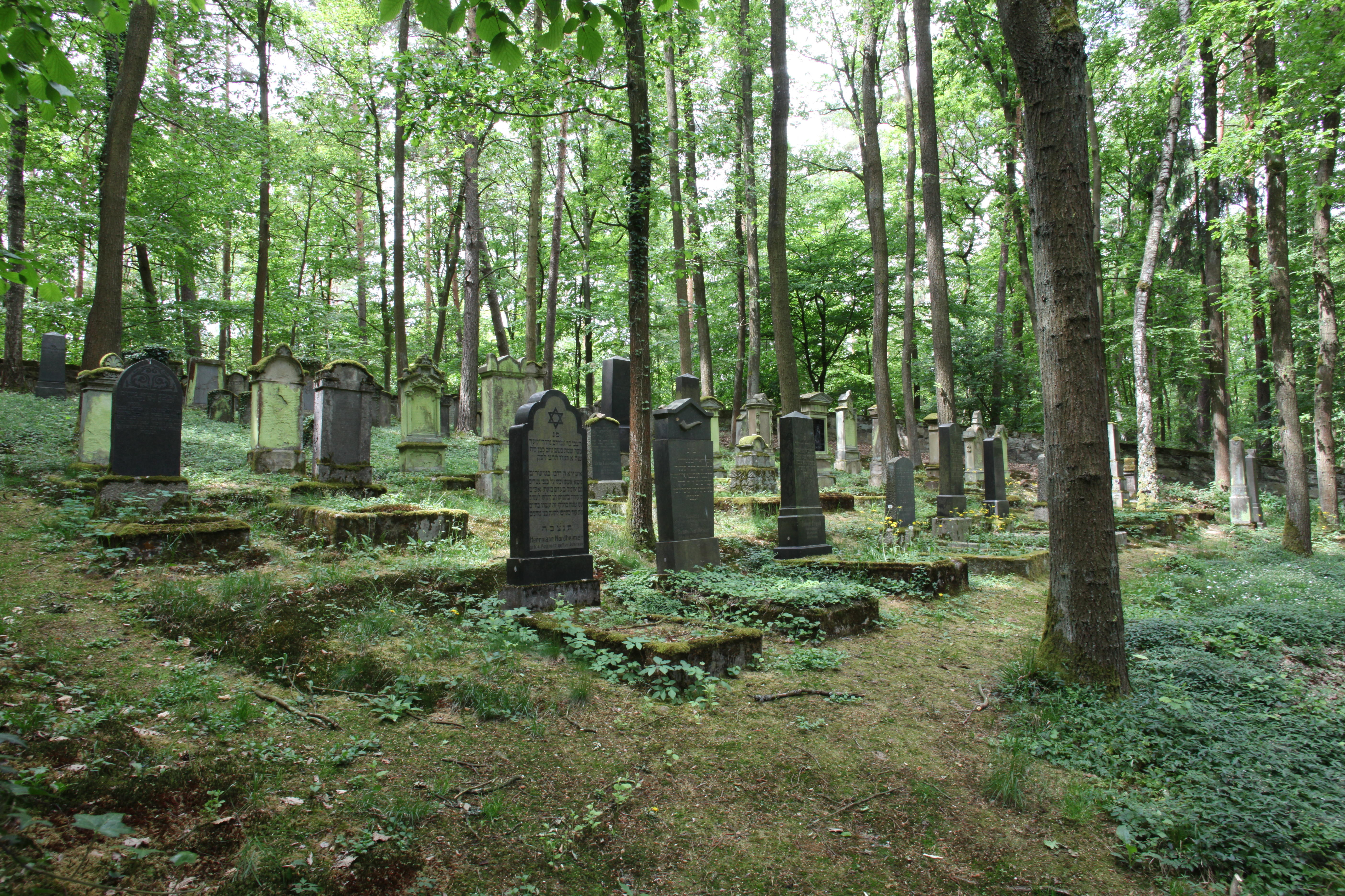 Memmelsdorf, Landkreis Haßberge, Jüdischer Friedhof